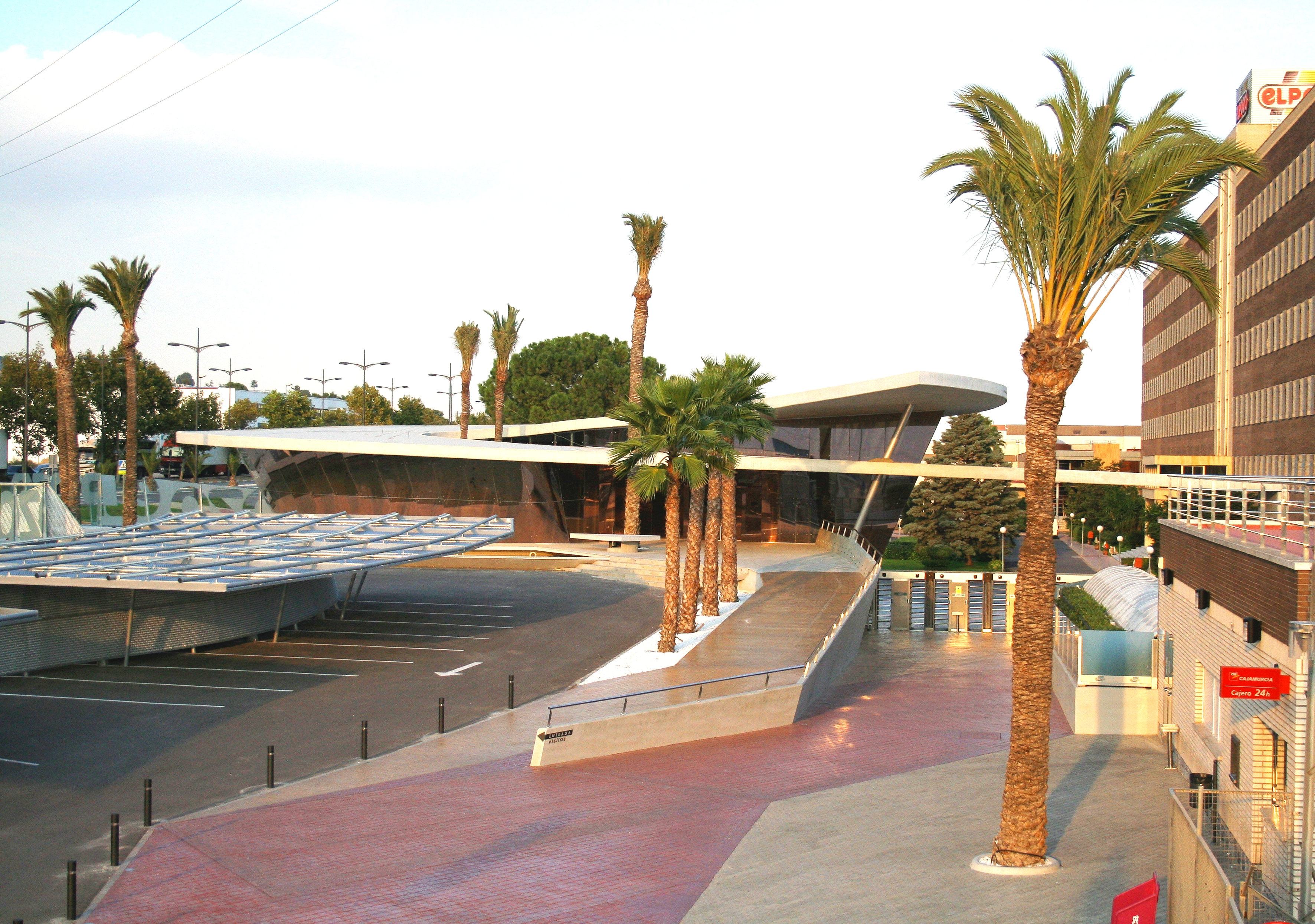 Entrada a las instalaciones de ElPozo